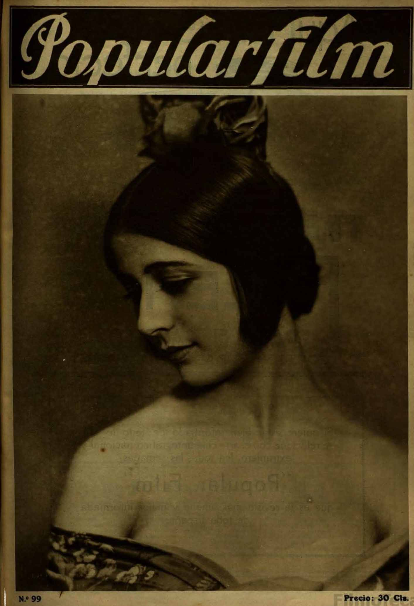 Coberta del numero 100 de la revista Popular Films